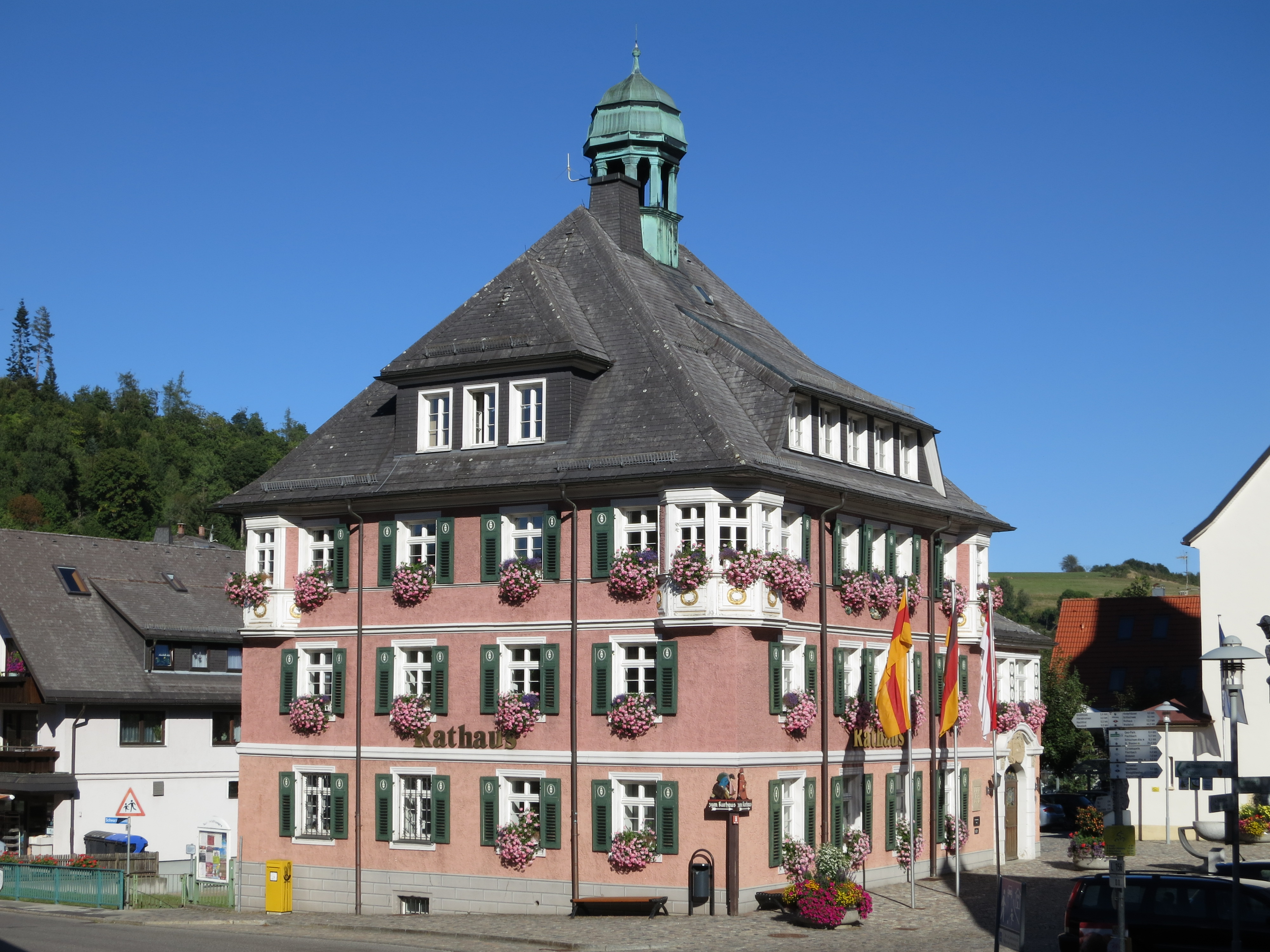 Rathaus in Lenzkirch im Schwarzwald.